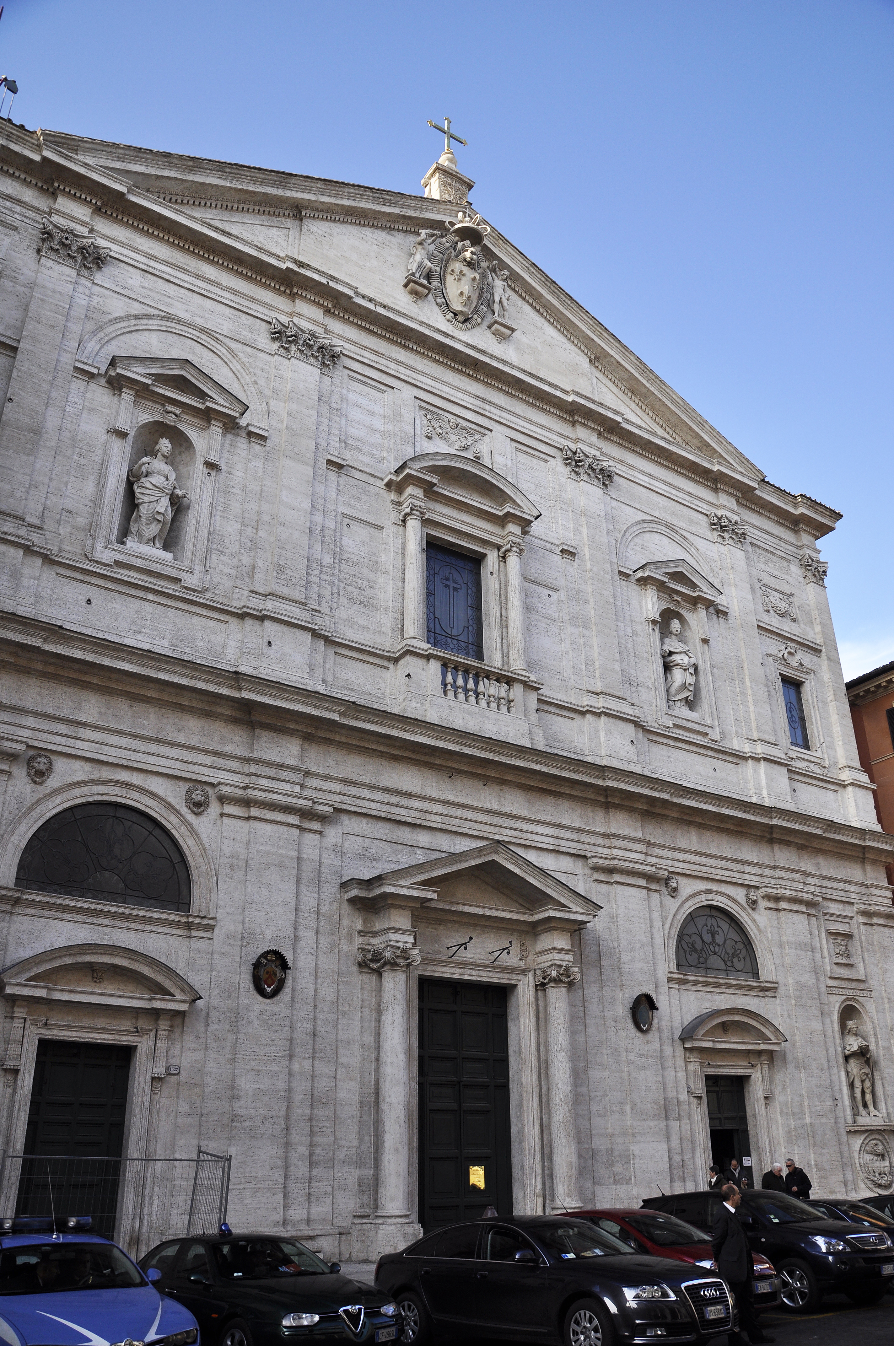 De kerk San Luigi dei Franchesi in Rome